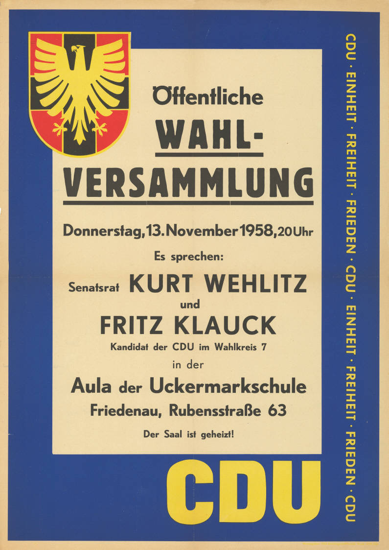 Öffentliche Wahl- Versammlung ... Es sprechen: Senatsrat Kurt Wehlitz und Fritz Klauck Kandidat der CDU im Wahlkreis 7 ... Der Saal ist geheizt! CDU CDU . Einheit . Freiheit . Frieden . CDU . Einheit ... Plakatart: Ankündigungsplakat Auftraggeber: CDU-Bundesgeschäftsstelle Drucker_Druckart_Druckort: KVD, Köln Objekt-Signatur: 10-004 : 209 Bestand: Plakate zu Abgeordnetenhauswahlen Berlin (10-004) GliederungBestand10-18: Plakate zu Abgeordnetenhauswahlen Berlin (10-004) » CDU Lizenz: KAS/ACDP 10-004 : 209 CC-BY-SA 3.0 DE